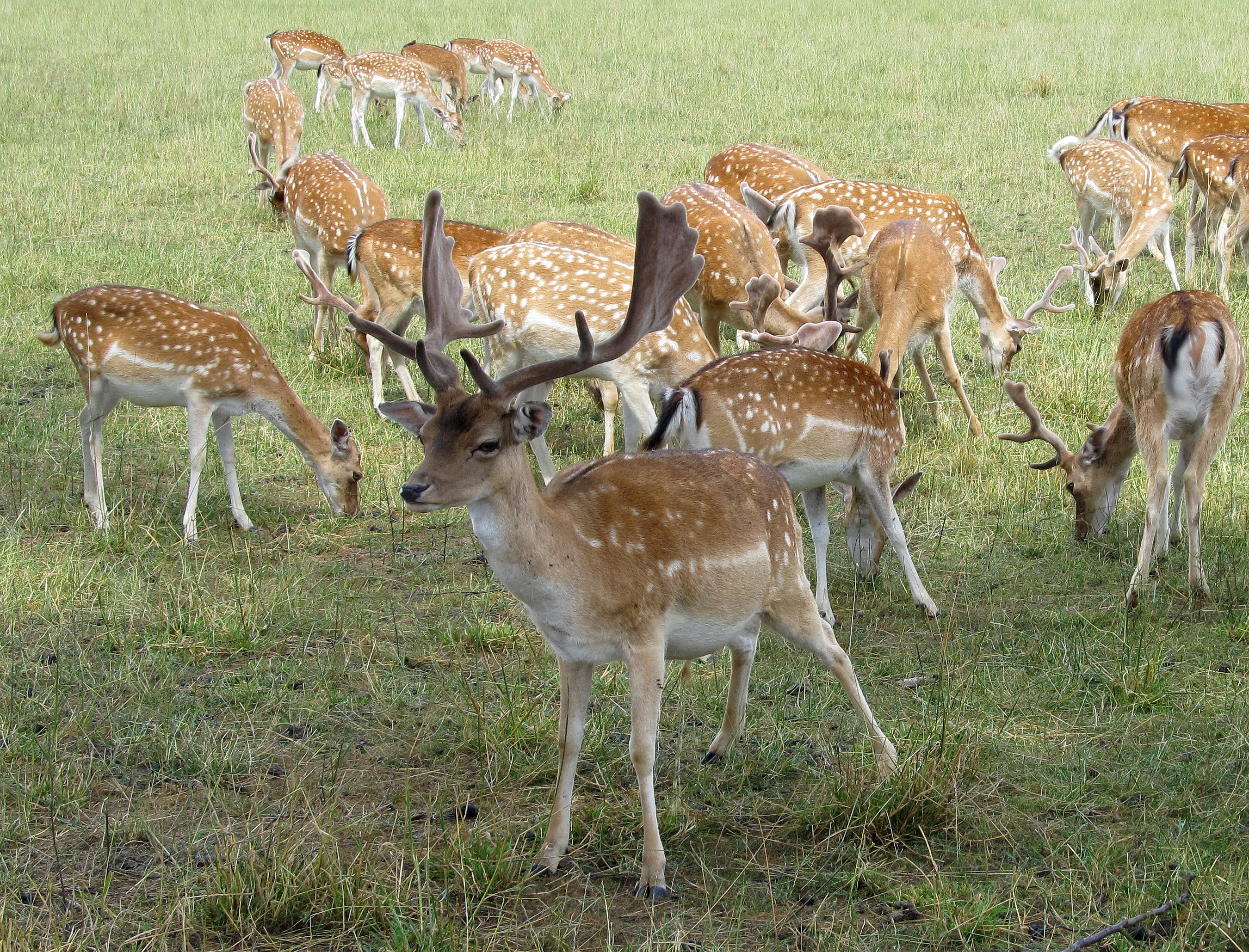 Damhirsche, Wildgehege, Am Huckelberg, Schmallenberg (Germany)